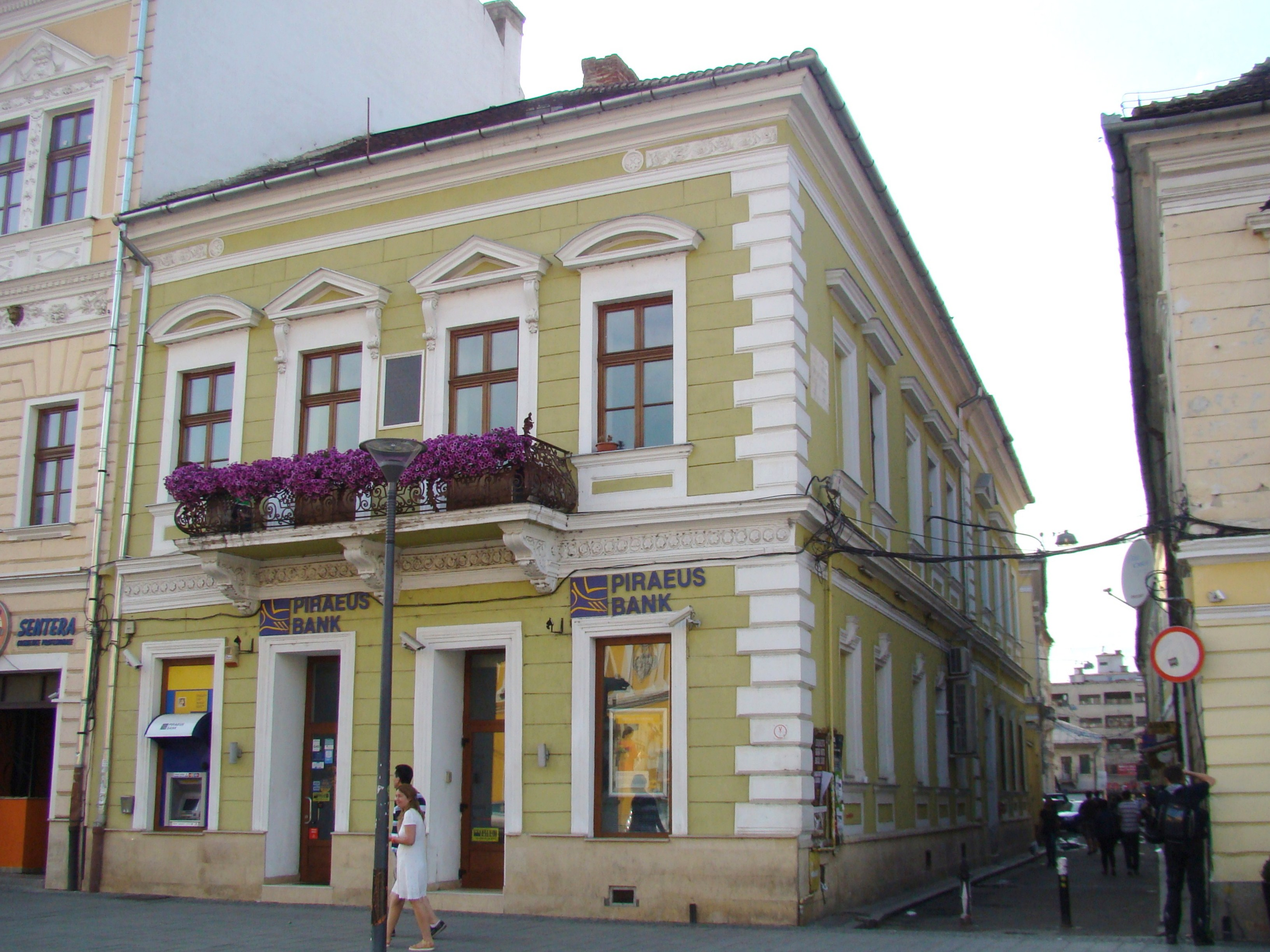 Casa în care s-a născut Bolyai Janos